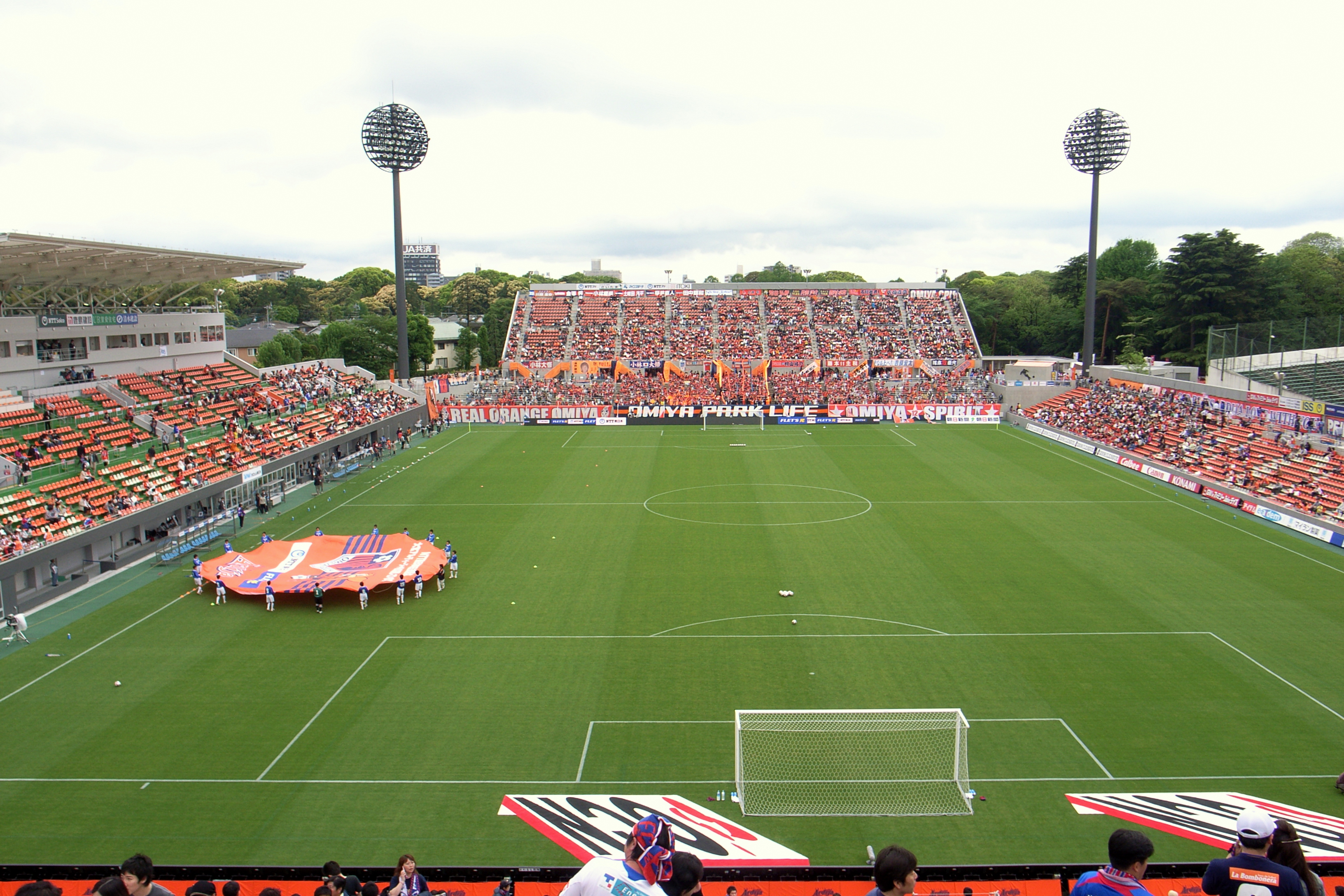 Ōmiya Park Soccer Stadium, Saitama Prefecture, Japan. On May 3, 2008. Omiya Ardija vs. F.C. Tokyo.